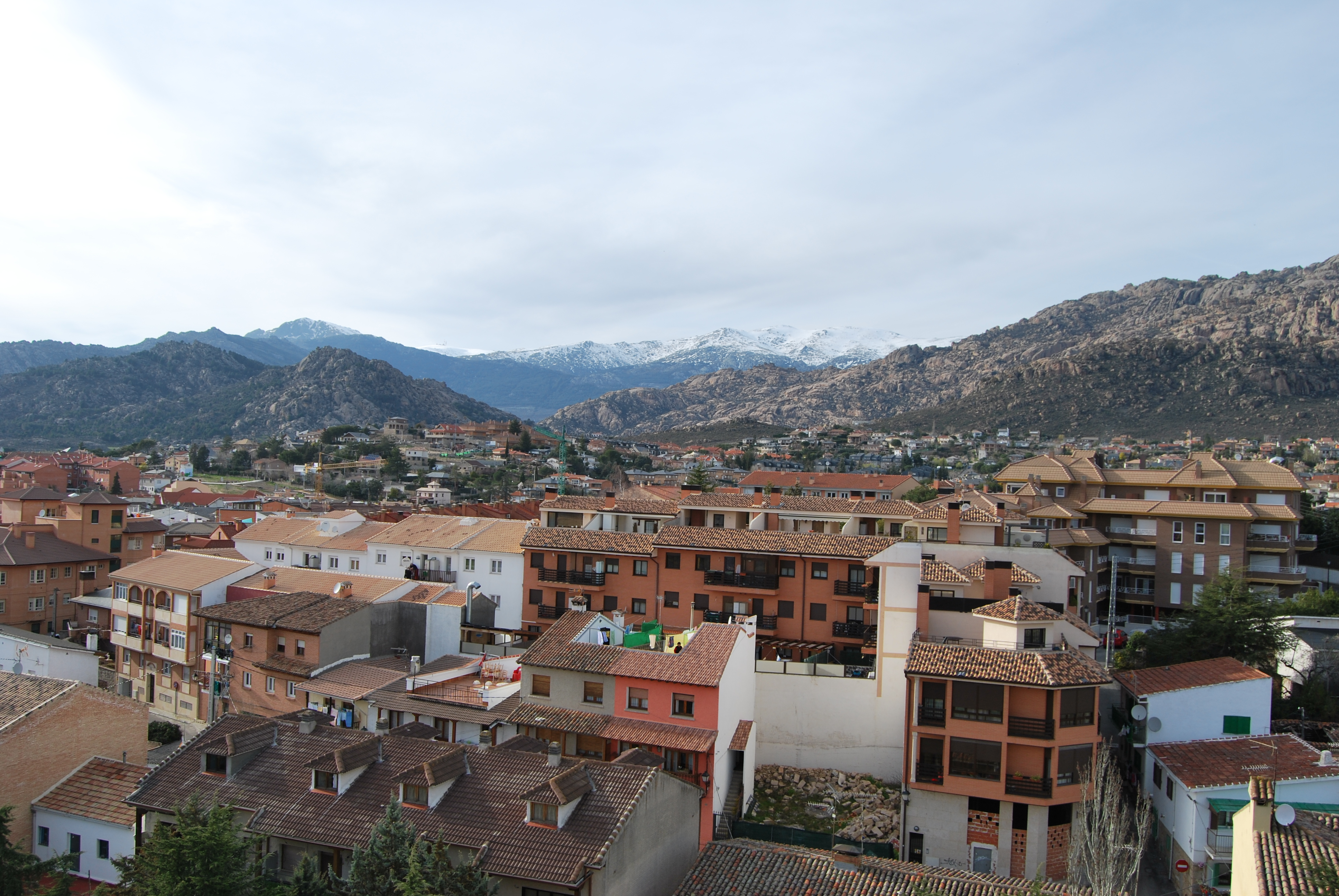 Manzanares el Real